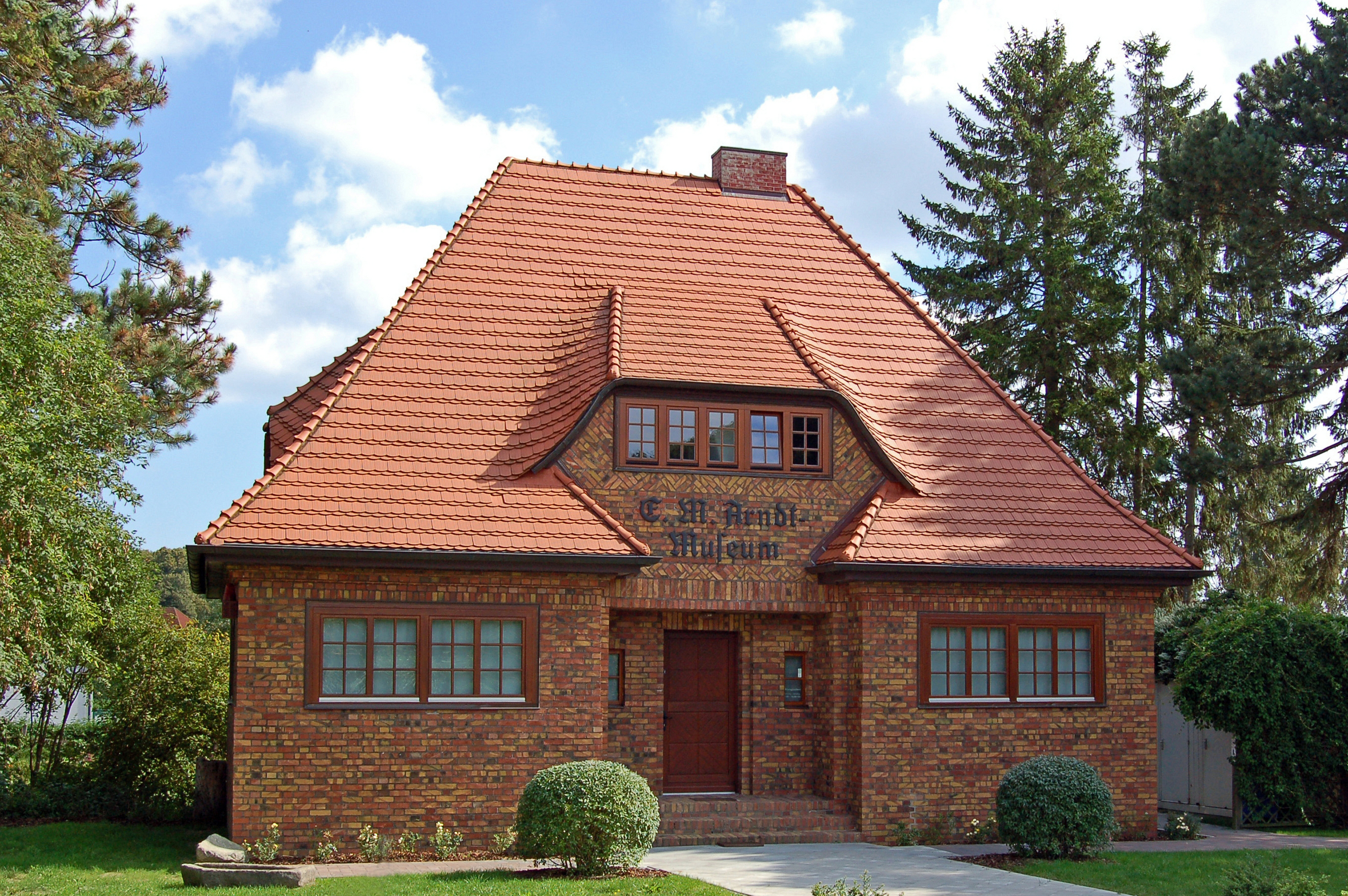 Der kleine Ort Garz liegt im Süden der Insel Rügen. Nach Stralsund sind es 23 Kilometer. Seit 2004 gehört auch die Halbinsel Zudar zum Ort. Südlich liegt einer der wenigen größeren Seen der Insel Rügen, der Garzer See. Sehenswert sind u. a. die ev. St.-Petri-Kirche, das Ernst-Moritz-Arndt-Geburtshaus bei Schloss Schoritz, das E.-M.-Arndt-Museum, die alte Schule, das Rathaus und die teilweise restaurierten Bürgerhäuser. Der Ortskern wurde im Rahmen der Städtebauförderung seit 1991 restauriert. Es gibt aber auch noch etliche Gebäude, an denen es noch viel zu tun gibt.